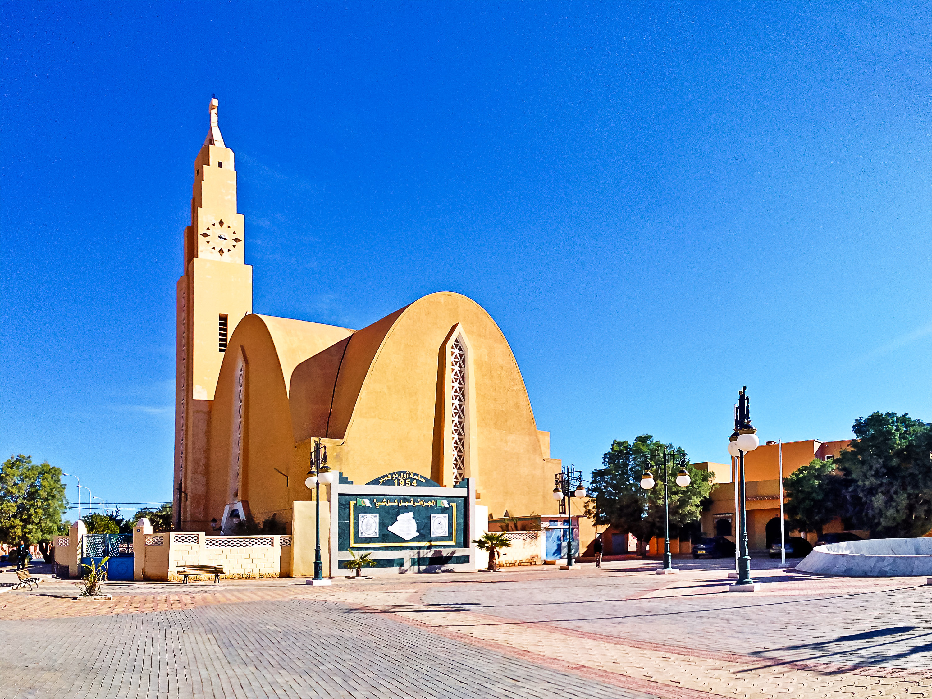 مسجد مالك بن الحويرث بساحة اول نوفمبر بمدينة بشار - الجزائر Mosquée Malik Ibn El Houairith, place du 1er Novembre à Bechar